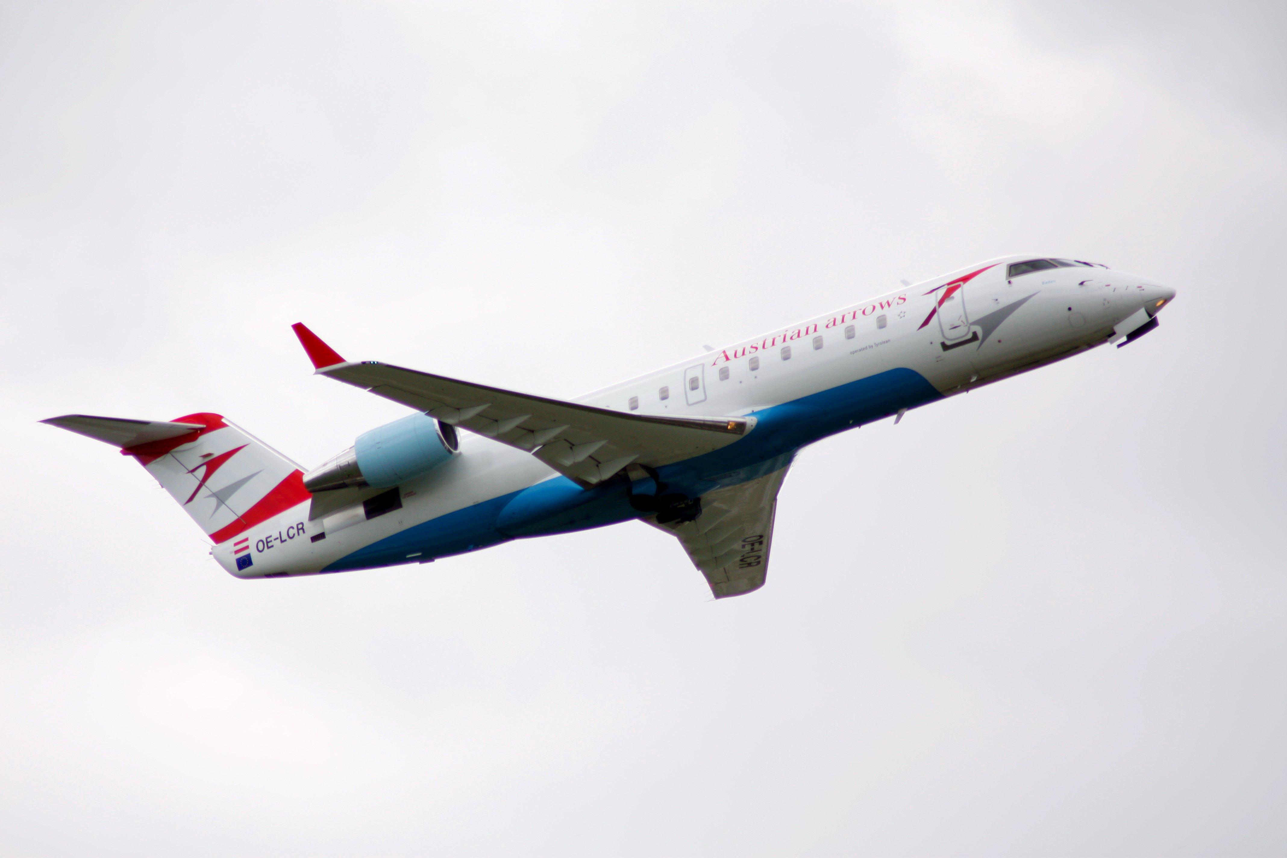 CRJ-200 der Austrian Arrows beim Start vom Flughafen Wien-Schwechat